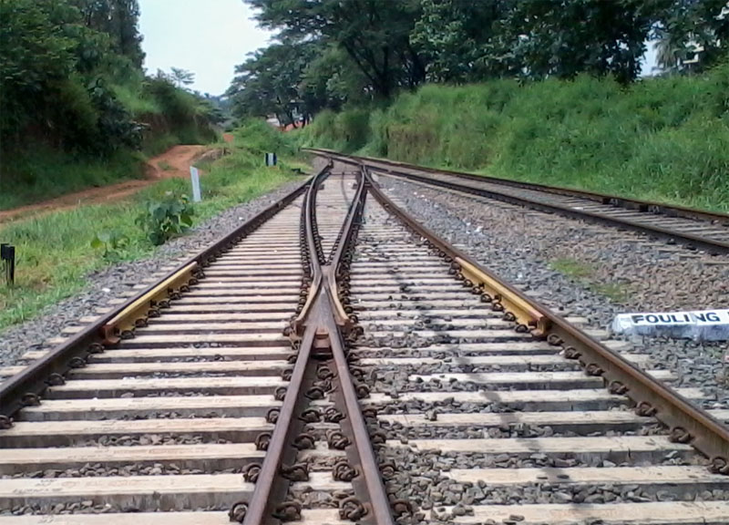 രണ്ട് റെയിൽപ്പാളങ്ങളും അവയുടെ സന്ധിയും